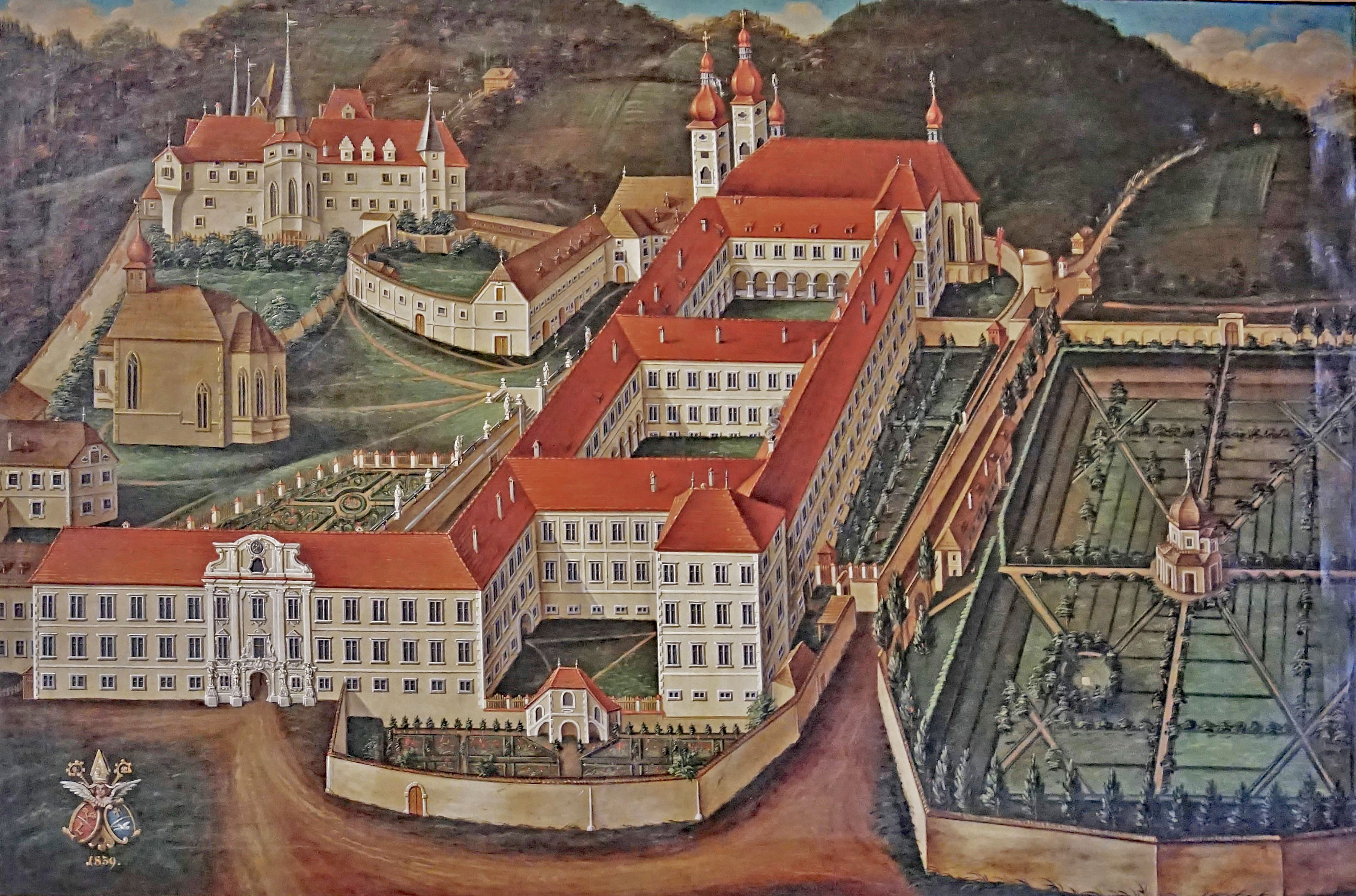 Gemälde des Benediktinerstiftes St. Lambrecht von 1839